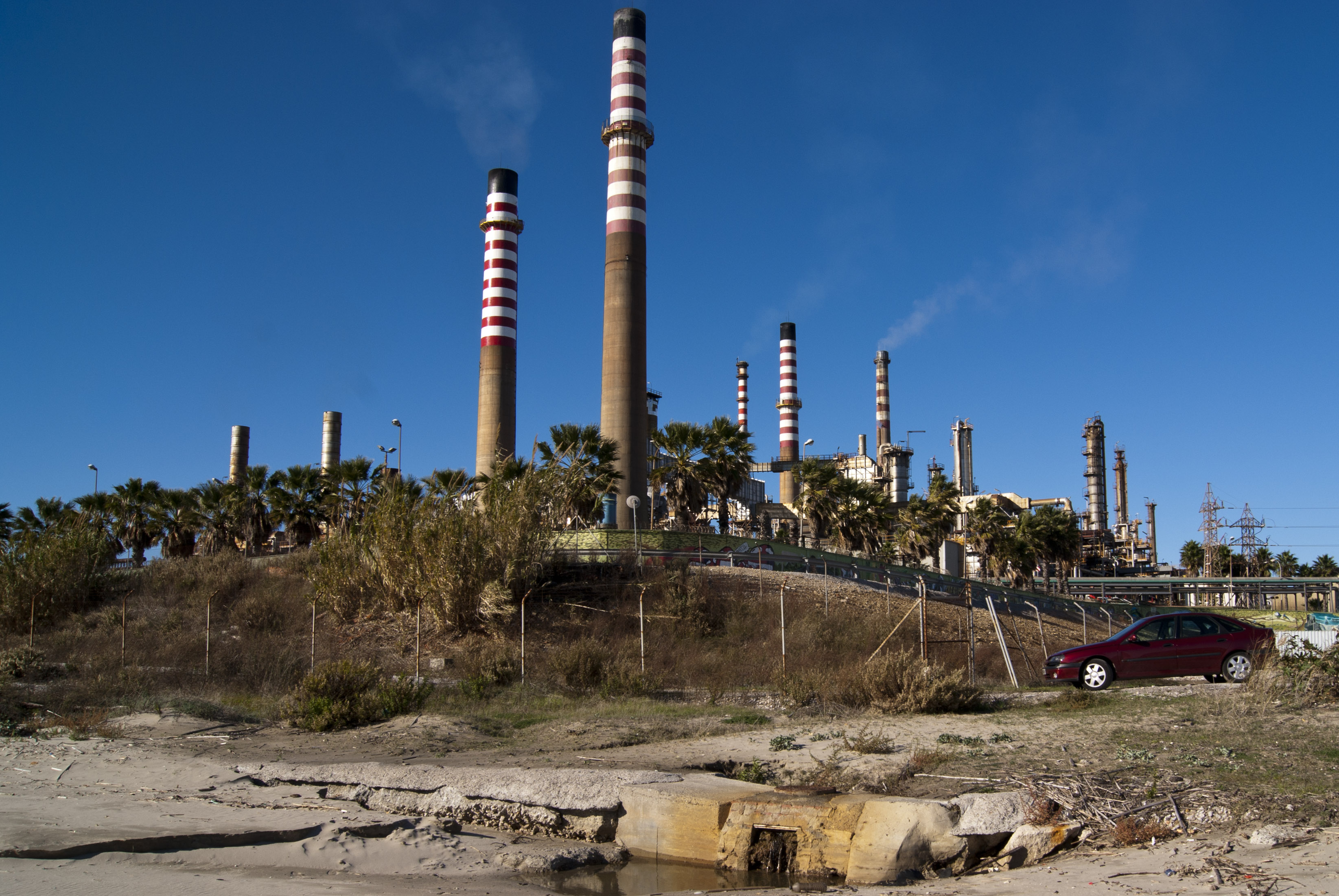 CEPSA Refinery Gibraltar-San Roque, San Roque, Spain